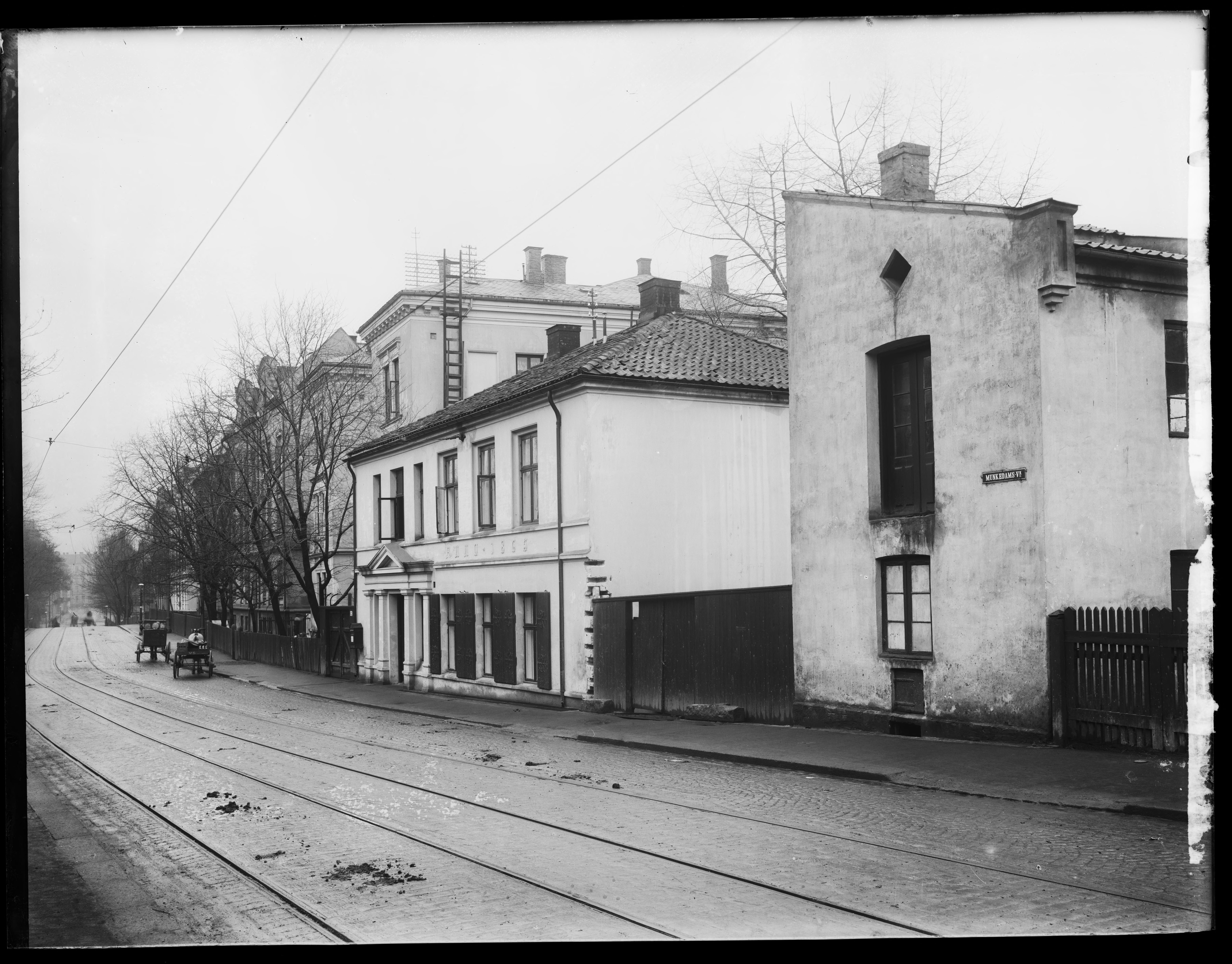 Bildet er hentet fra Nasjonalbibliotekets bildesamling. Anmerkninger til bildet var: Påskrift arkivark: Ingeniør Bjerke Eldste arkivnummer: 347 Oslo, Oslo, Oslo. Bildet viser nr. 82 (ark. N.S.D. Eckhoff, oppført 1865, ifølge skriften på veggen). Bakenfor skimtes nr. 80, 78 osv.